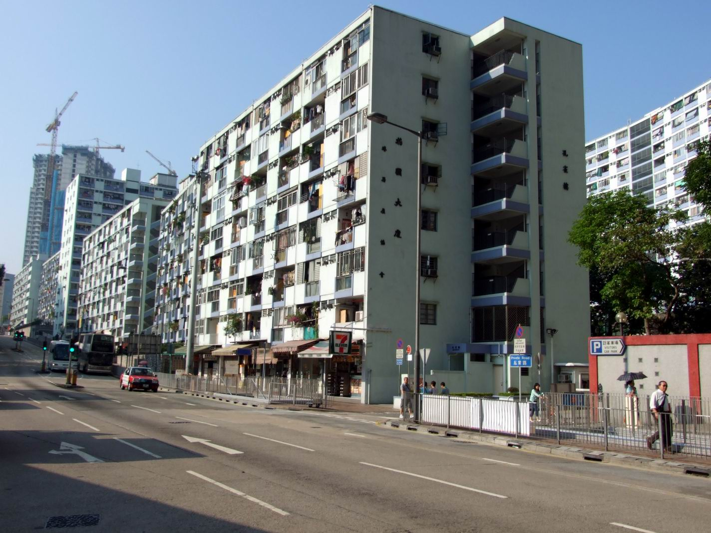 花園大廈第二期孔雀樓